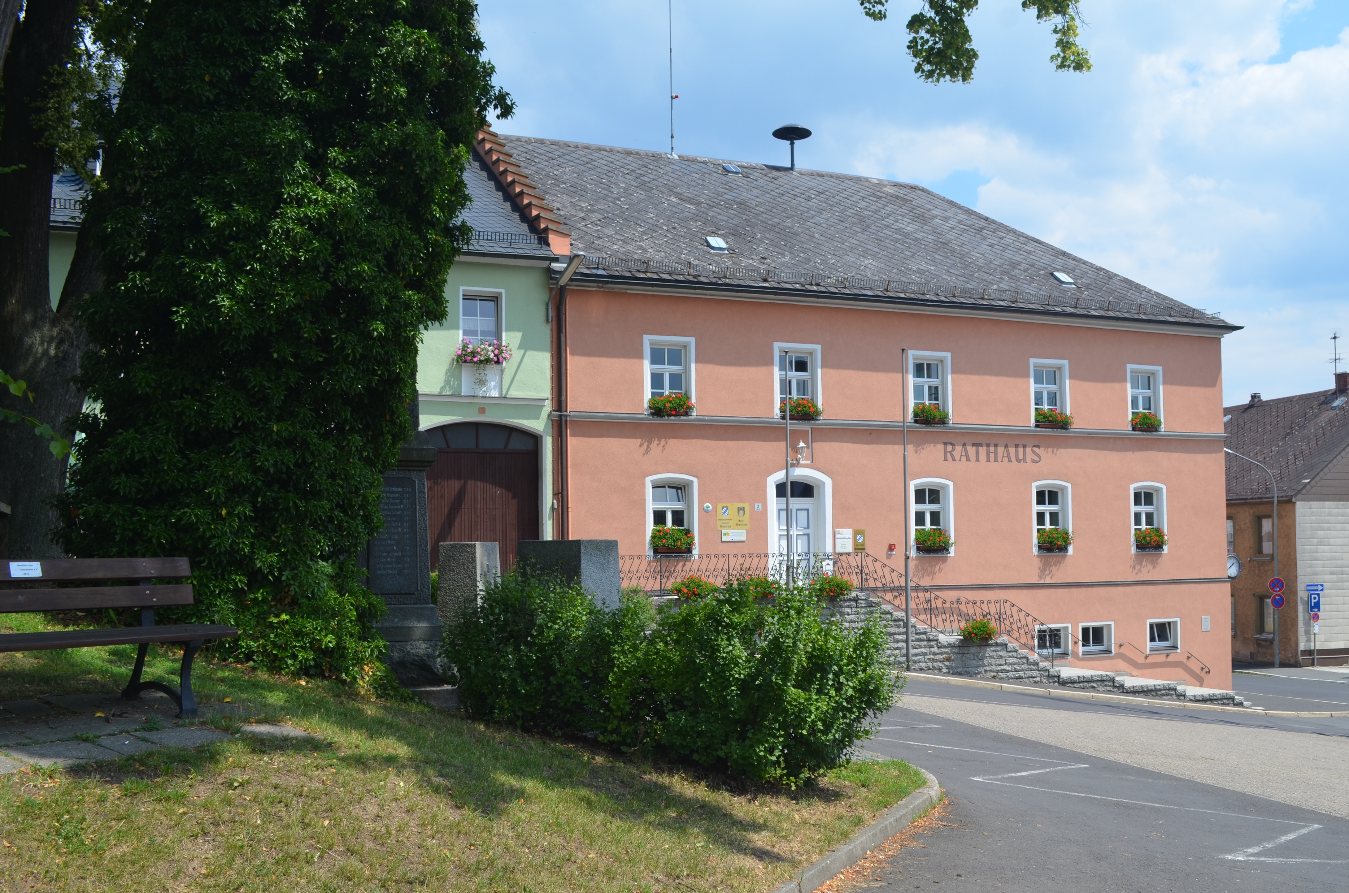 Thiersheim (Oberfranken-Deutschland) - Rathaus.